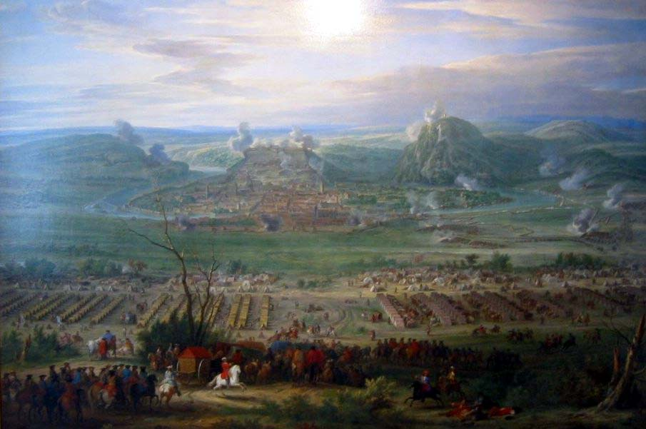 Image ameliorée de Besancon_1678_Louis_XIV.jpg avec Adophe Photoshop